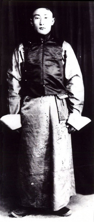 都固尔苏隆 (1917-1952)